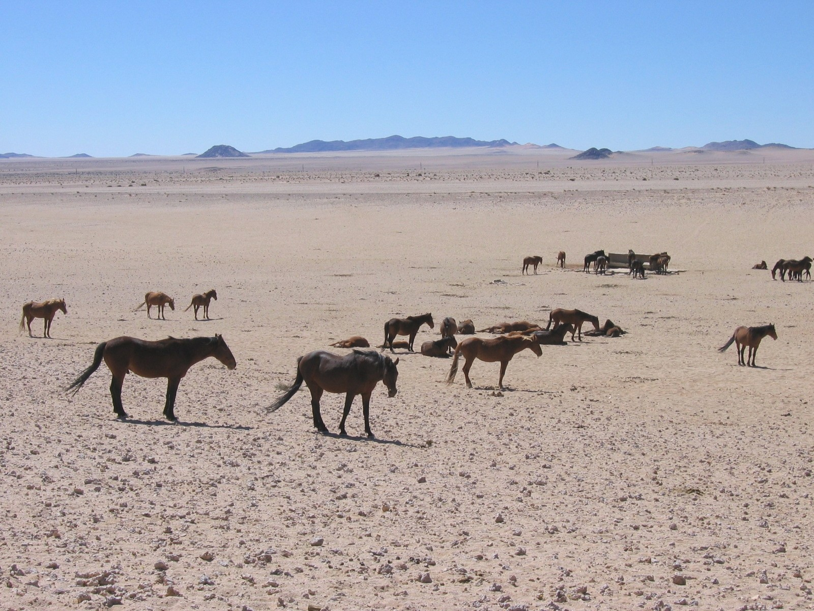 Wildpferde, Aus, Namibia